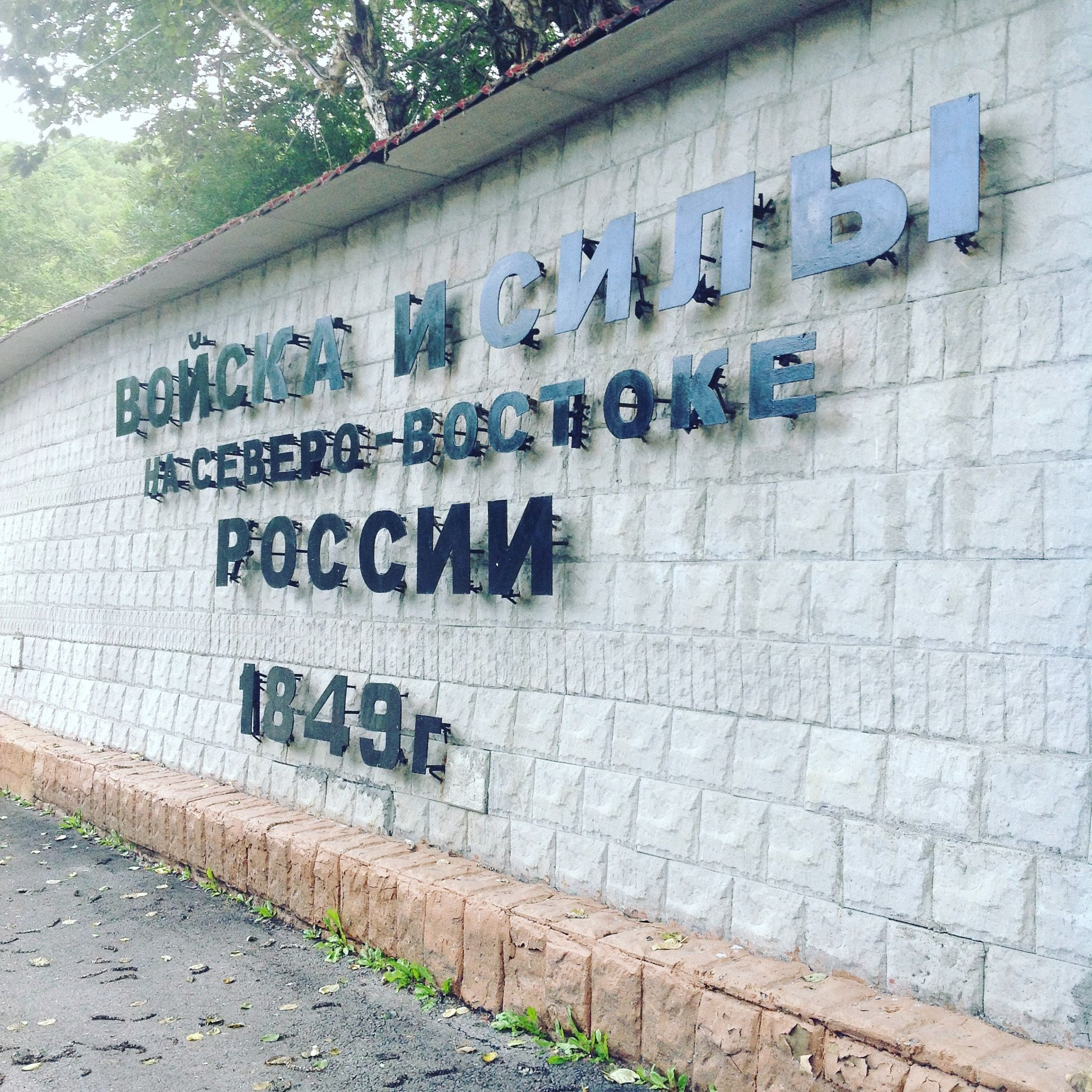 Войска и силы на северо-востоке (бывшая Камчатская флотилия разнородных сил) в Петропавловске-Камчатском